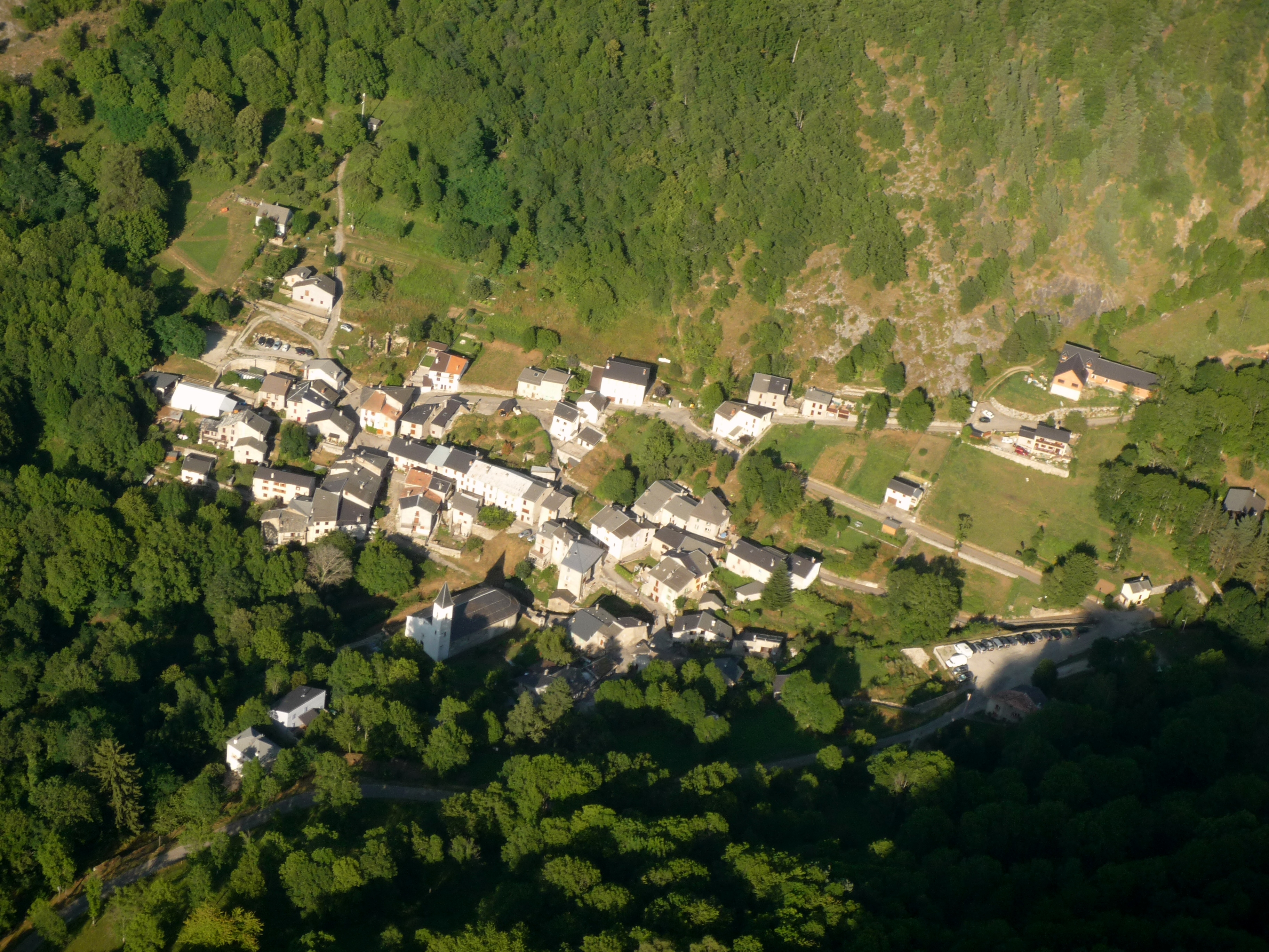 Vue aérienne de la commune de Sem en Ariège, prise en parapente